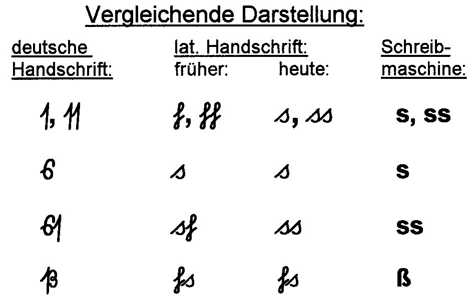 Vergeichende s-Schreibung für den standesamtlichen Gebrauch (für Leute die unbedingt noch ihr langes s im Namen erhalten wollen) in alter deutscher Handschrift mit langem s, alter lateinischer Handschrift mit langem s und ohne ß, "moderner" lateinischer Handschrift ohne ß, moderne Schreibaschine